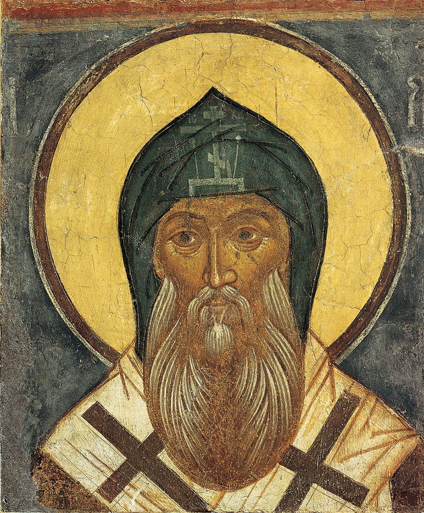 Святой Арсений, епископ Тверской Фрагмент стенной росписи из Троицкого собора Макарьева Калязина монастыря